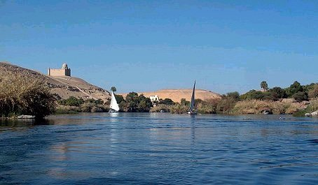 Nillandschaft in Oberägypten Foto Dr. H. Sulzer herbye Ägypten Feb 2004